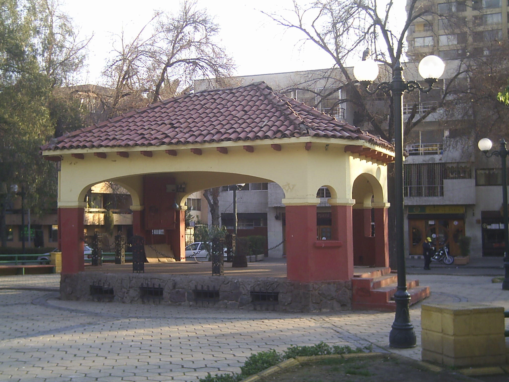 Pérgola donde se realizan actividades culturales en la Plaza Ñuñoa